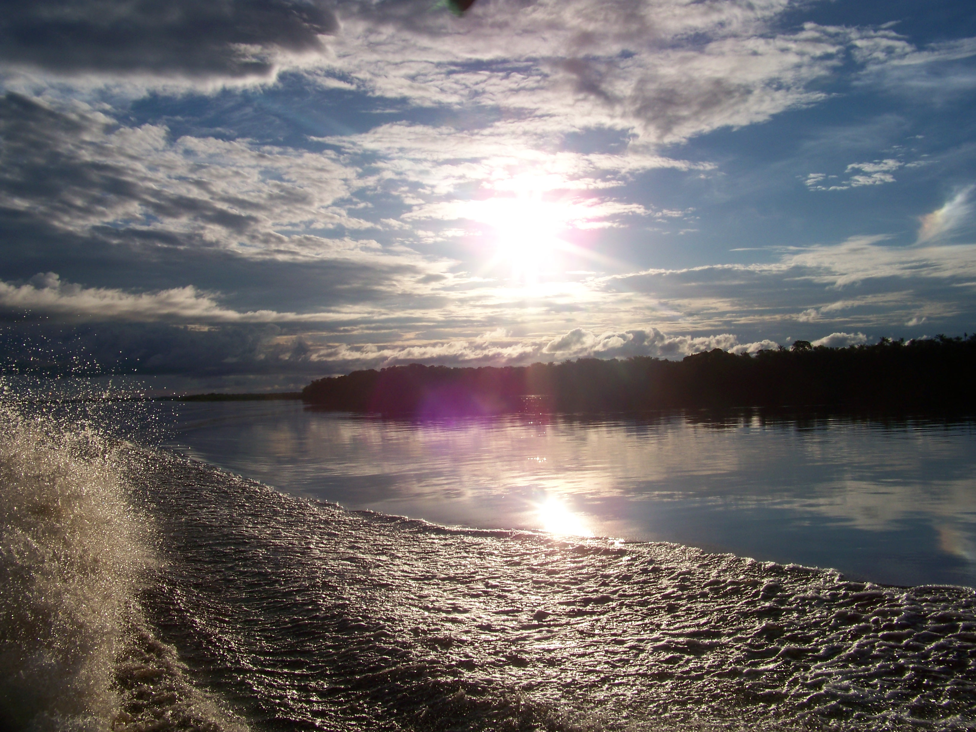 Rio Negro Sunset foi uma foto feita por mim, a bordo do barco Expresso Diamantina, dentro do parque estadual da serra do Aracá, nas mediações da cidade de Santa Isabel do Rio Negro.